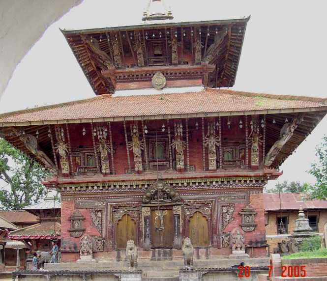 Храмовый комплекс Чангу НараянХрамовый комплекс Чангу Нараян в Непале